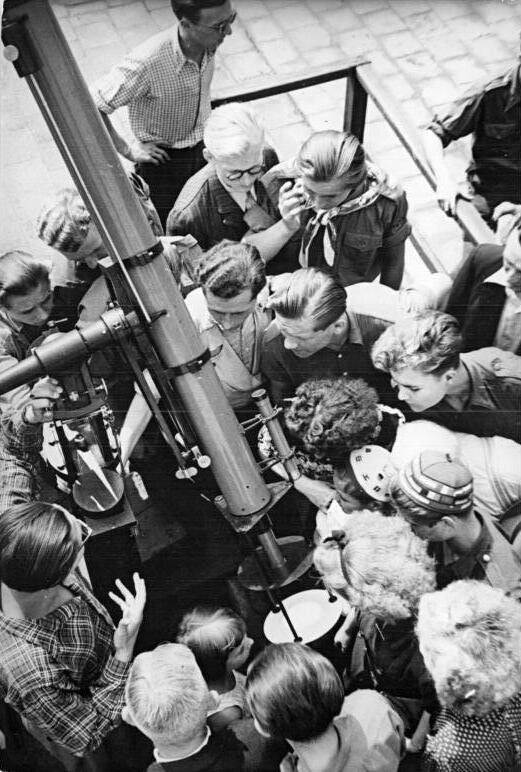 Berlin, Treptow, Archenhold-Sternwarte, Teleskop Zu den III. Weltfestspielen in Berlin Teilnehmer der III. Weltfestspiele besichtigen die Archenhold-Sternwarte in Berlin-Treptow. Aufn. Illus Quaschinsky 579 AV Berlin W 8 7.8.51 Qu.